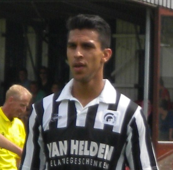 Esmat Shanwary in een vriendschappelijk duel met JVC Cuijk in 2014.